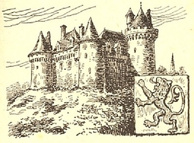 Le château du Juch (dessin de Louis Le Guennec publié dans la revue Feiz ha Breizh en novembre 1928).